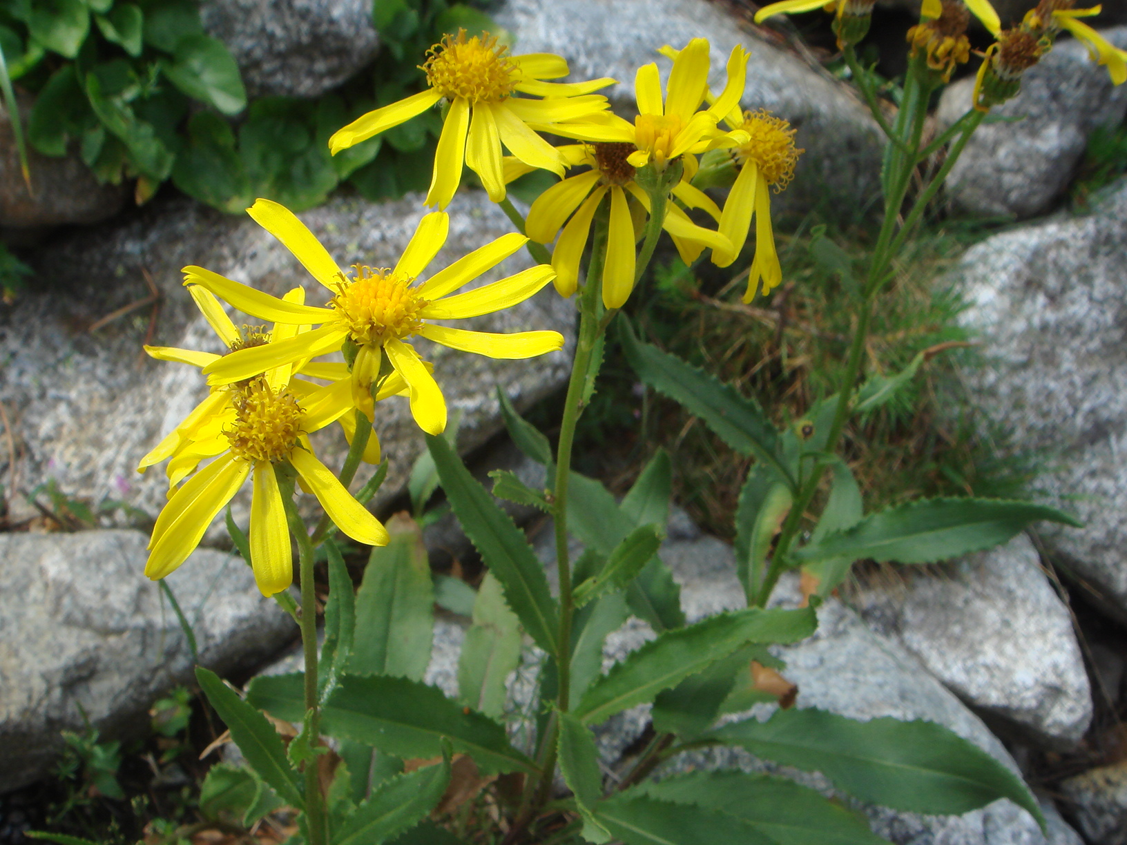 Senecio pyrenaicus, Valle Barrosa, (Huesca), España